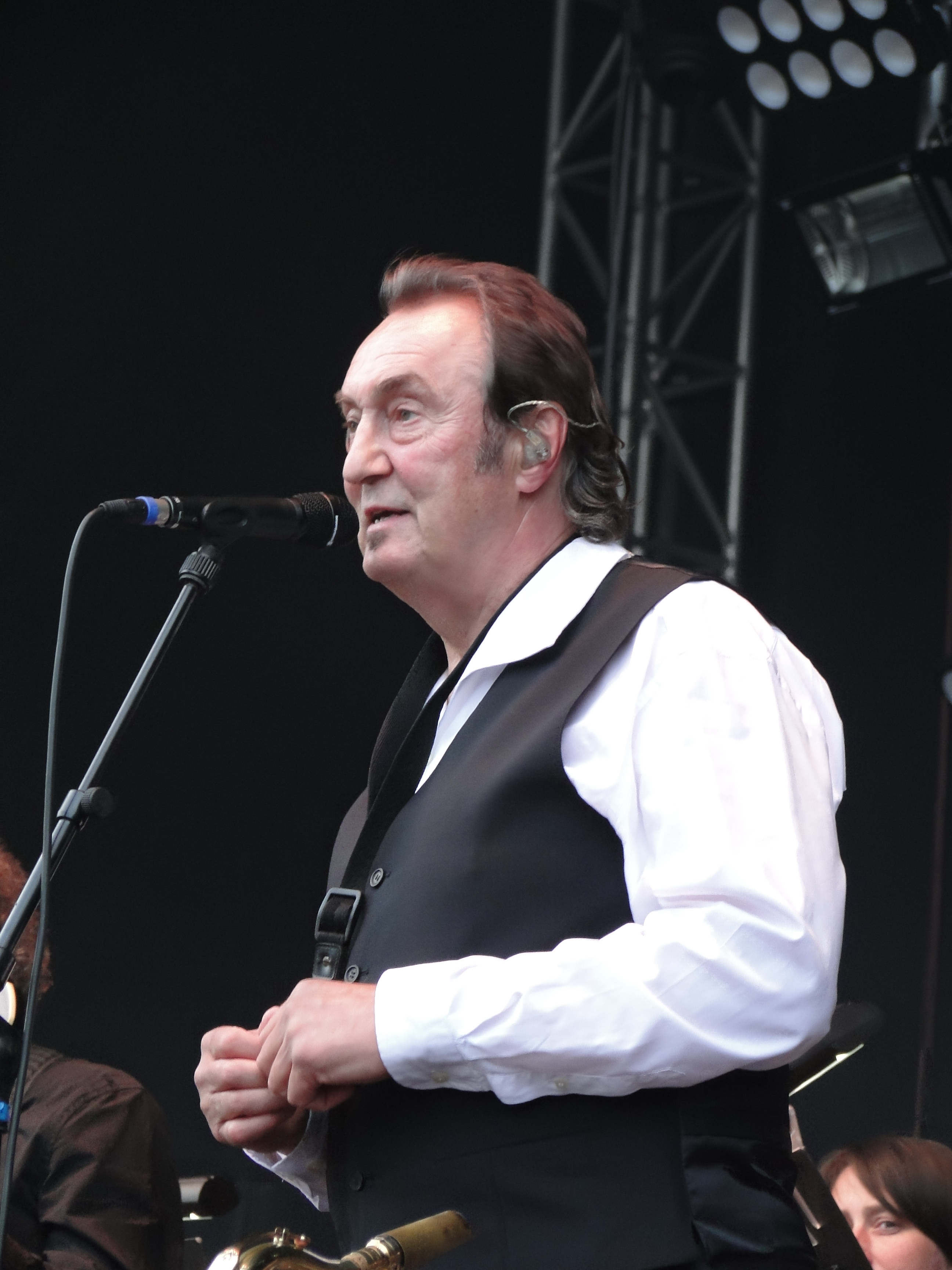 Bernd Aust, Gründungsmitglied der Dresdner Rockband electra, bei einem Konzert der Gruppe im August 2014 in Dresden